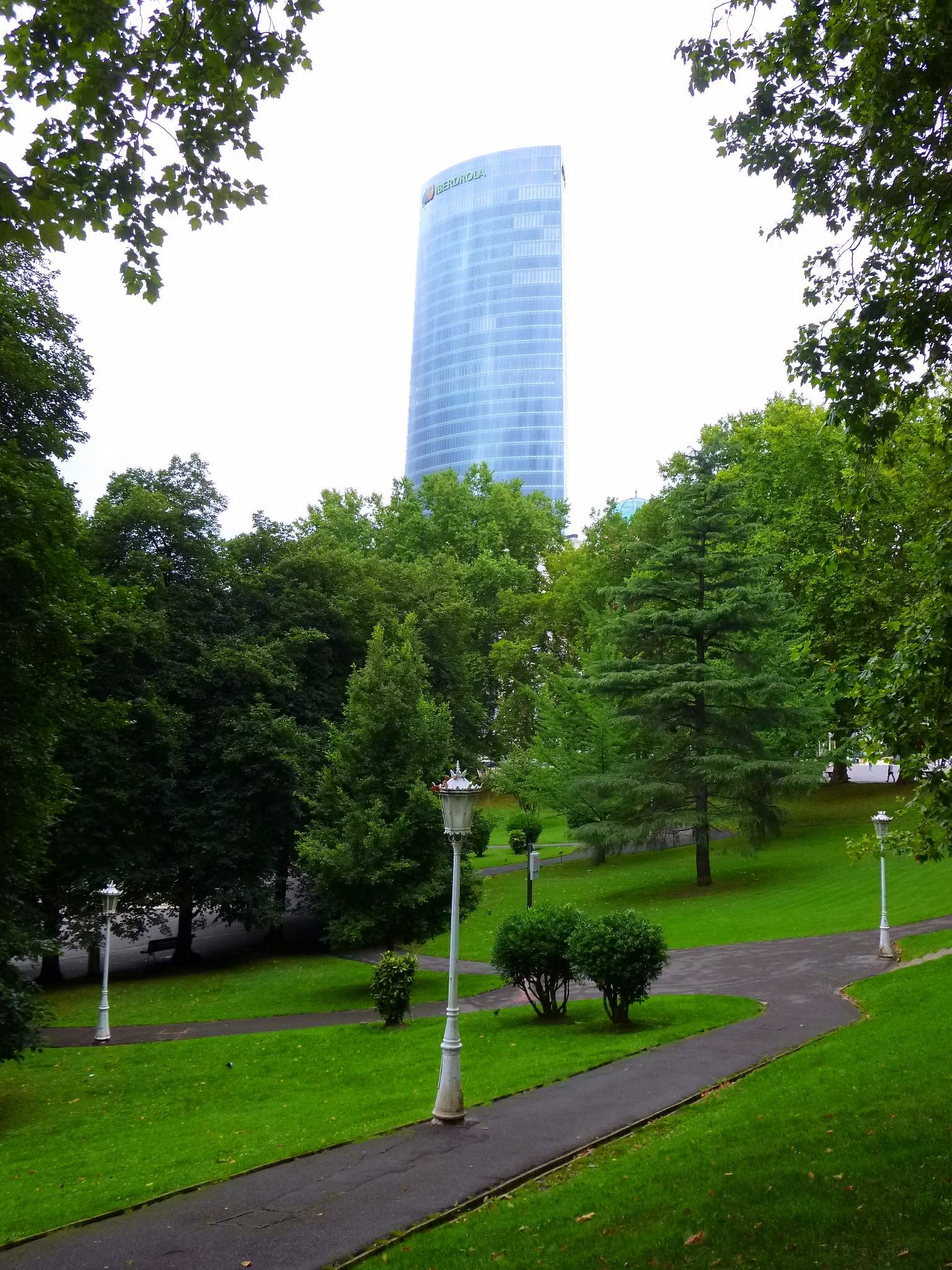 Parque de Doña Casilda Iturrízar, en Bilbao